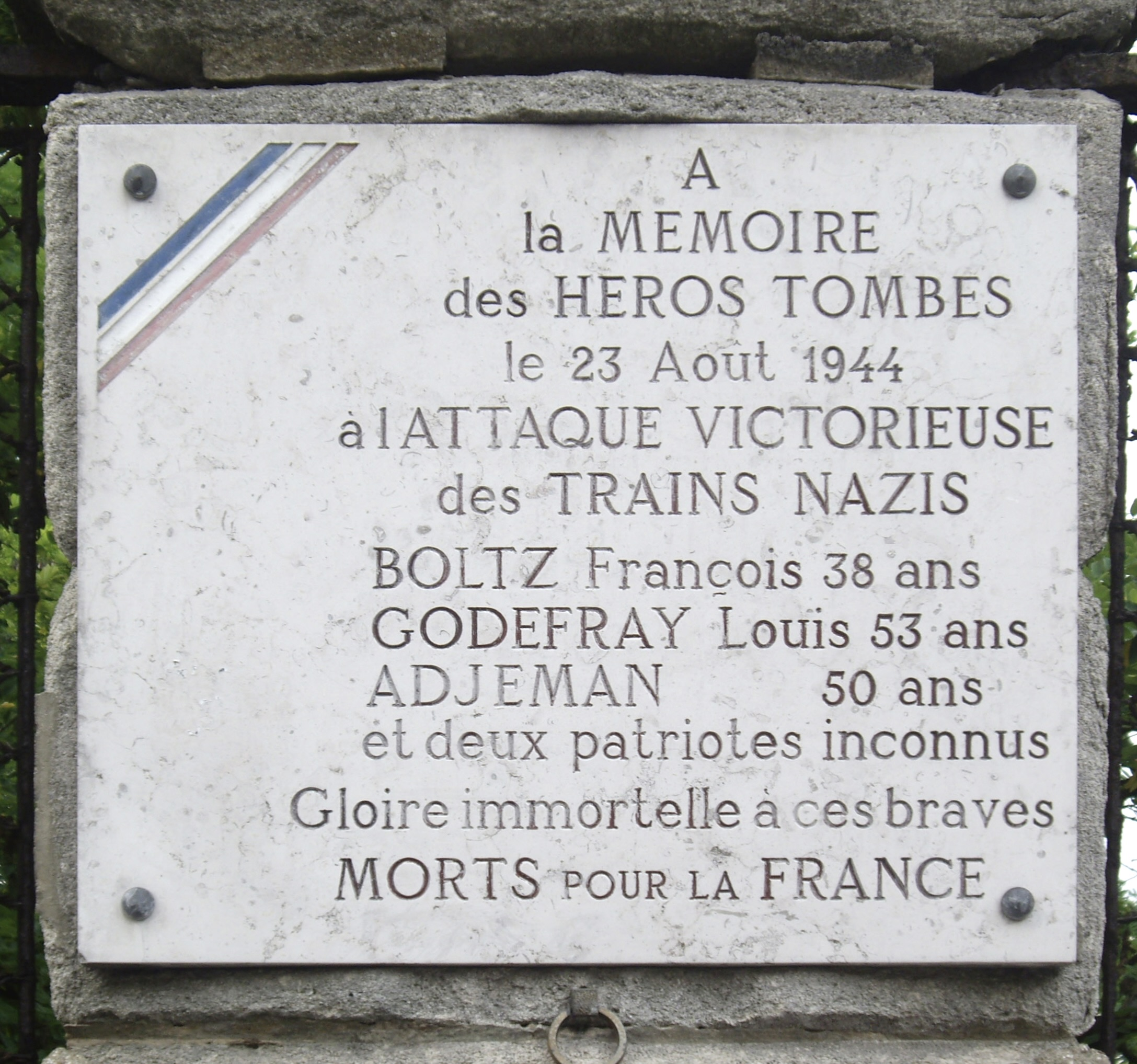 Plaque commémorative sur le pont de la ligne de la Petite Ceinture, 79 rue de Ménilmontant, Paris 20e.« À la mémoire des héros tombés le 23 août 1944 à l'attaque victorieuse des trains nazis :BOLTZ François, 38 ansGODEFR[O]Y Louis, 53 ansADJEMAN, 50 anset deux patriotes inconnus.Gloire immortelle à ces braves, morts pour la France. »